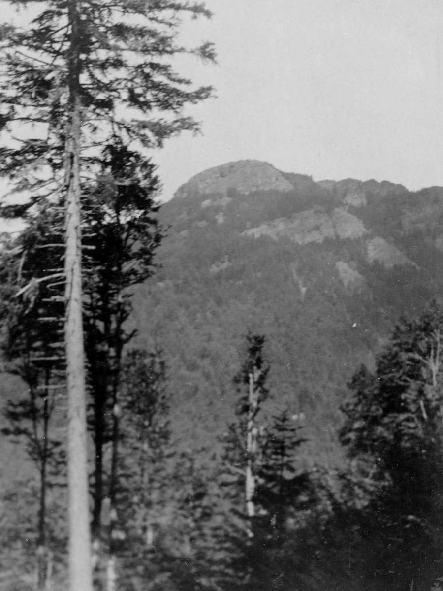 Hohe Kelch oder Hochkelch, ein Nebengipfel des Belchen im Schwarzwald, aufgenommen 1927 von Friedrich Hund.